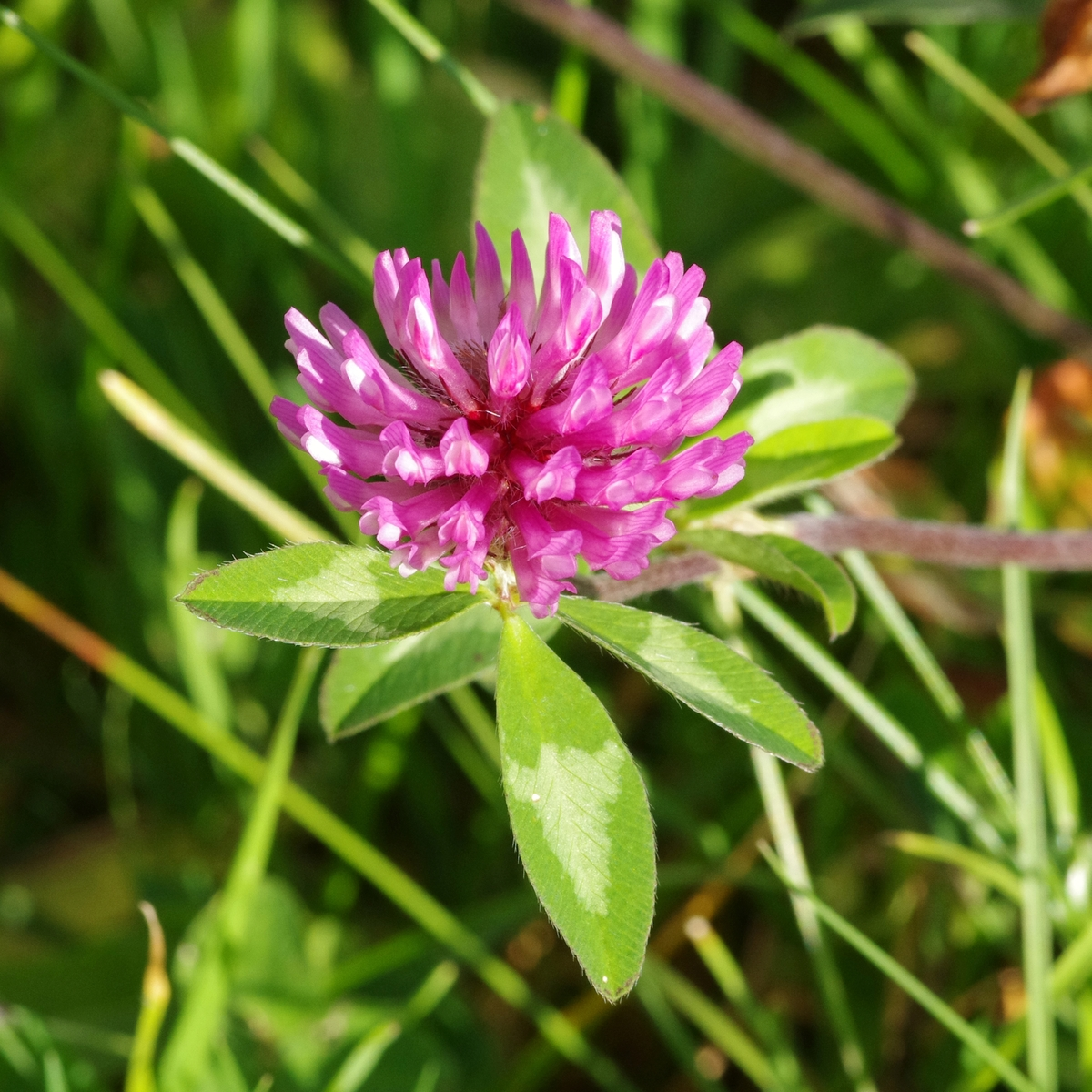 Trifolium pratense (Rotklee oder Wiesen-Klee)